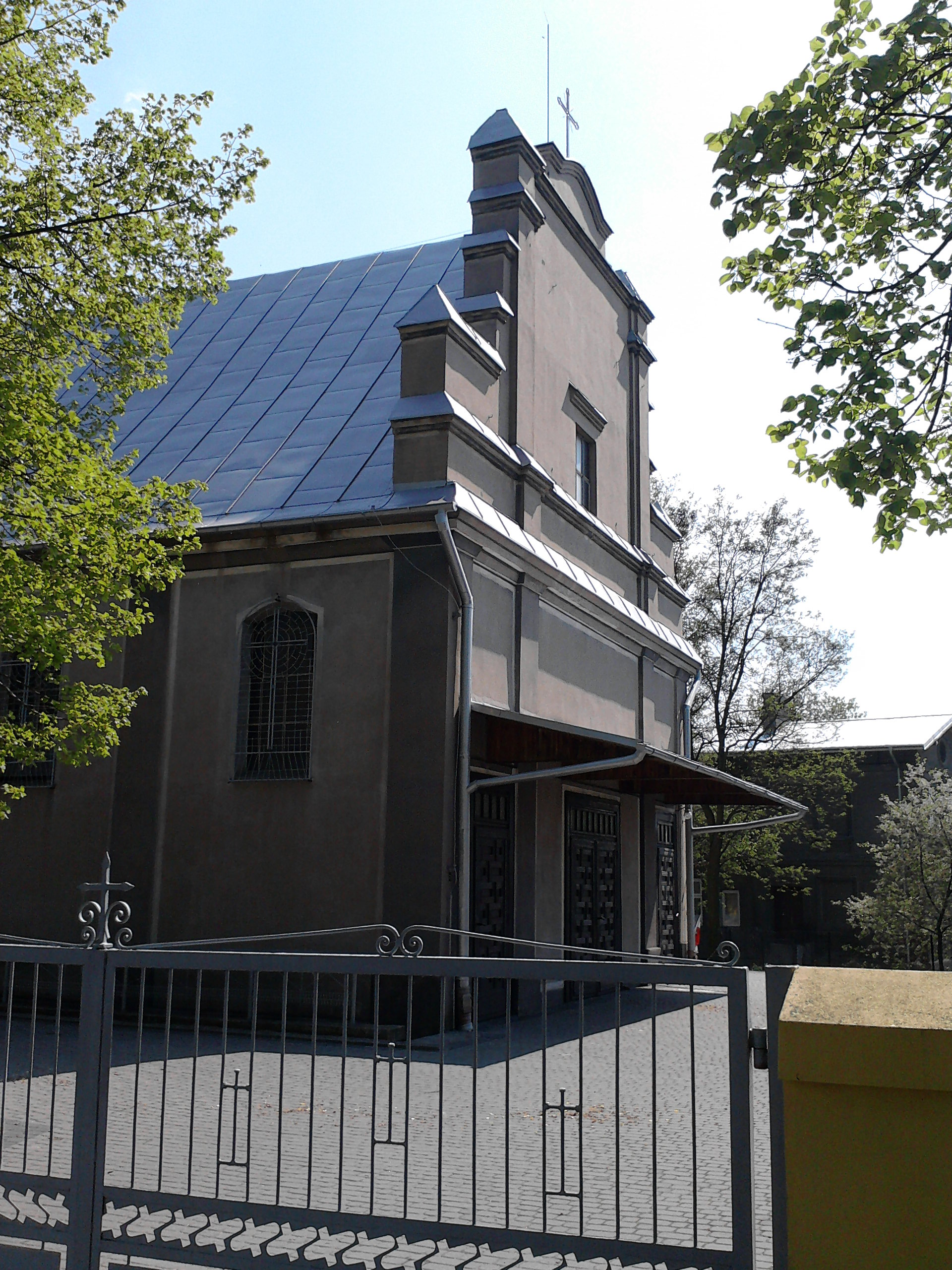 Kościół parafialny w Moszczenicy - fasada